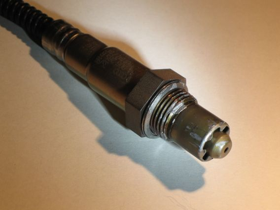 Lambdasonde